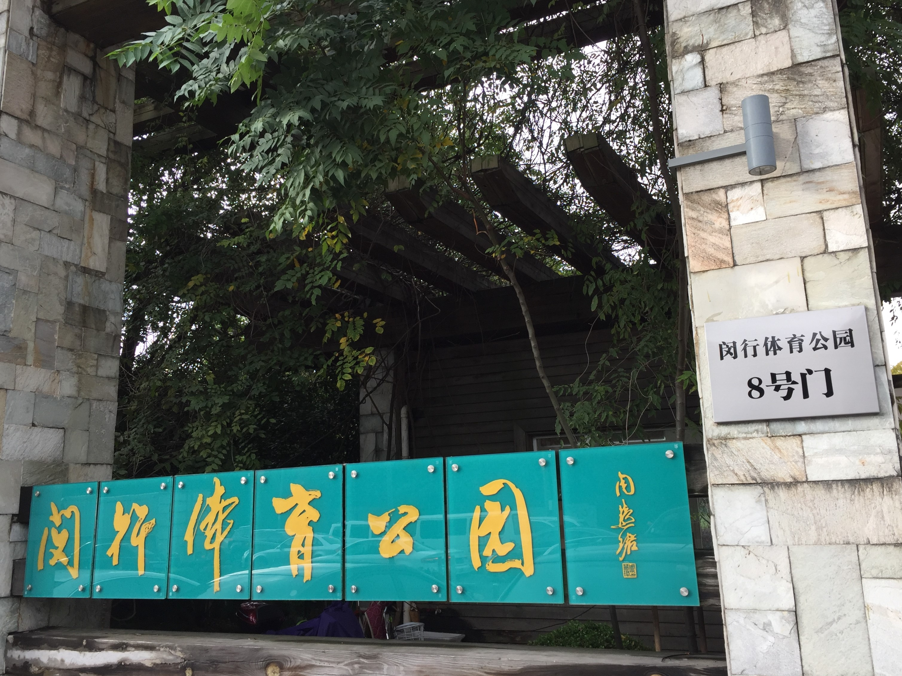 Minhang Sports Park, Shanghai